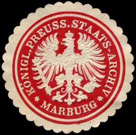 Sealing stamp Title: Königlich Preussisches Staats - Archiv - Marburg Description: rot, weiß, geprägt Place: Marburg size: 4 cm